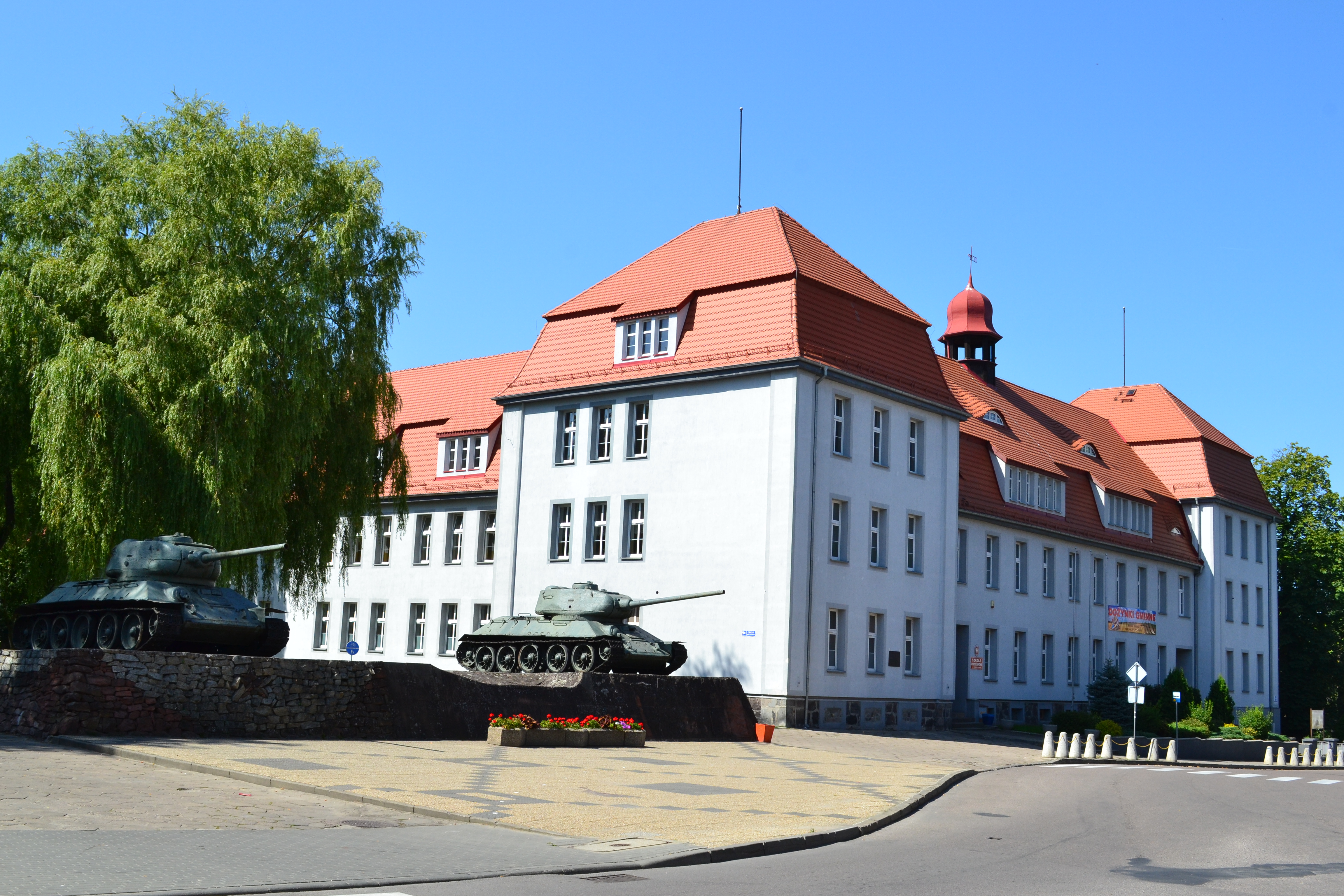 Szkoła Podstawowa w Drawsku Pomorskim oraz Pomnik Upamiętniający Żołnierzy Radzieckich